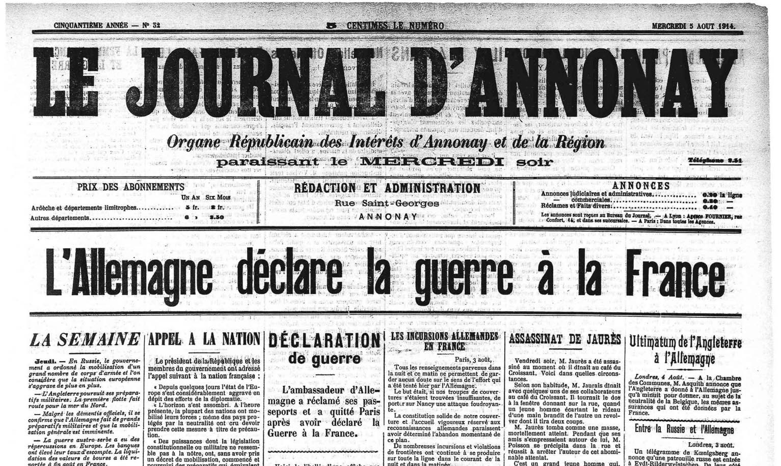 Quintenas J-Annonay 1914 self-photographed